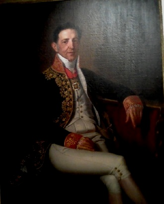 Barone Felice Pastore, ritratto